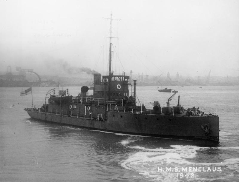 HMS MENELAUS underway in the Hamoaze.